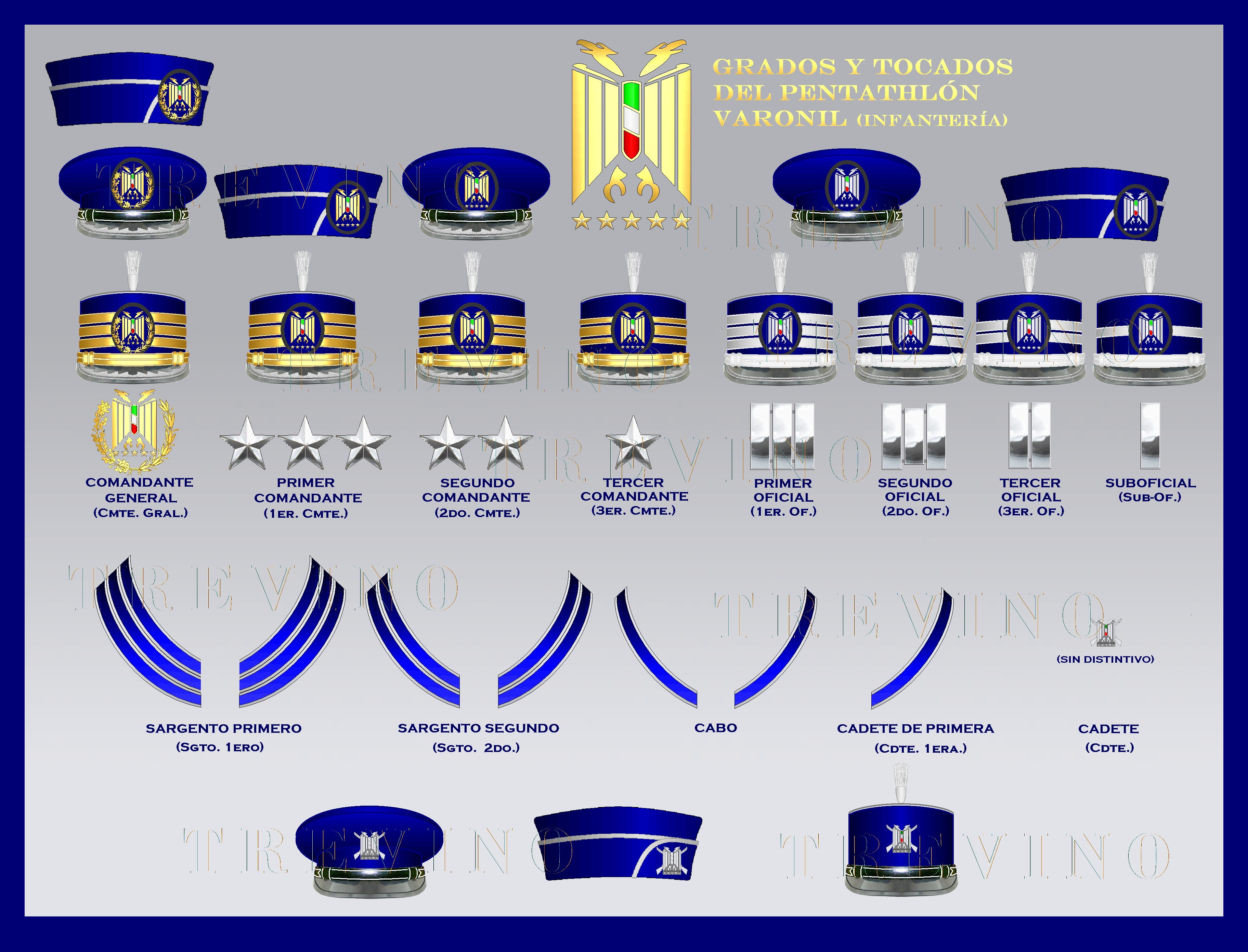 Grados Y Tocados del PDMU. Cuarteleras. Gorras de Guarnicion de diario y Ros (con galones de grado para Oficiales y Comandantes)